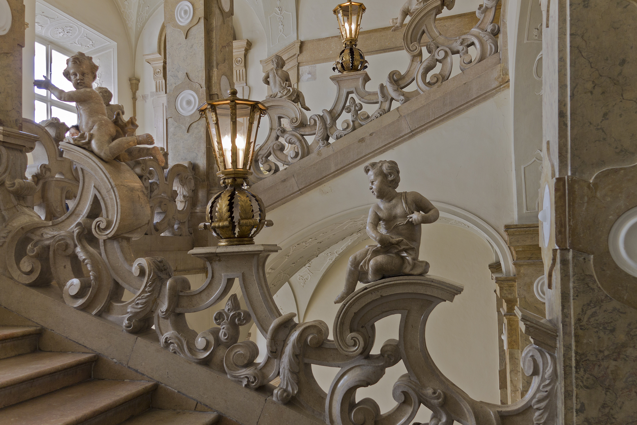 Salzburg – Schloss Mirabell: Marmorstiege Prunkstiege von Raphael Donner mit Putten und Laternen. Dieses Bild wurde anlässlich des österreichischen Tags des Denkmals 2014 in Salzburg eingereicht.